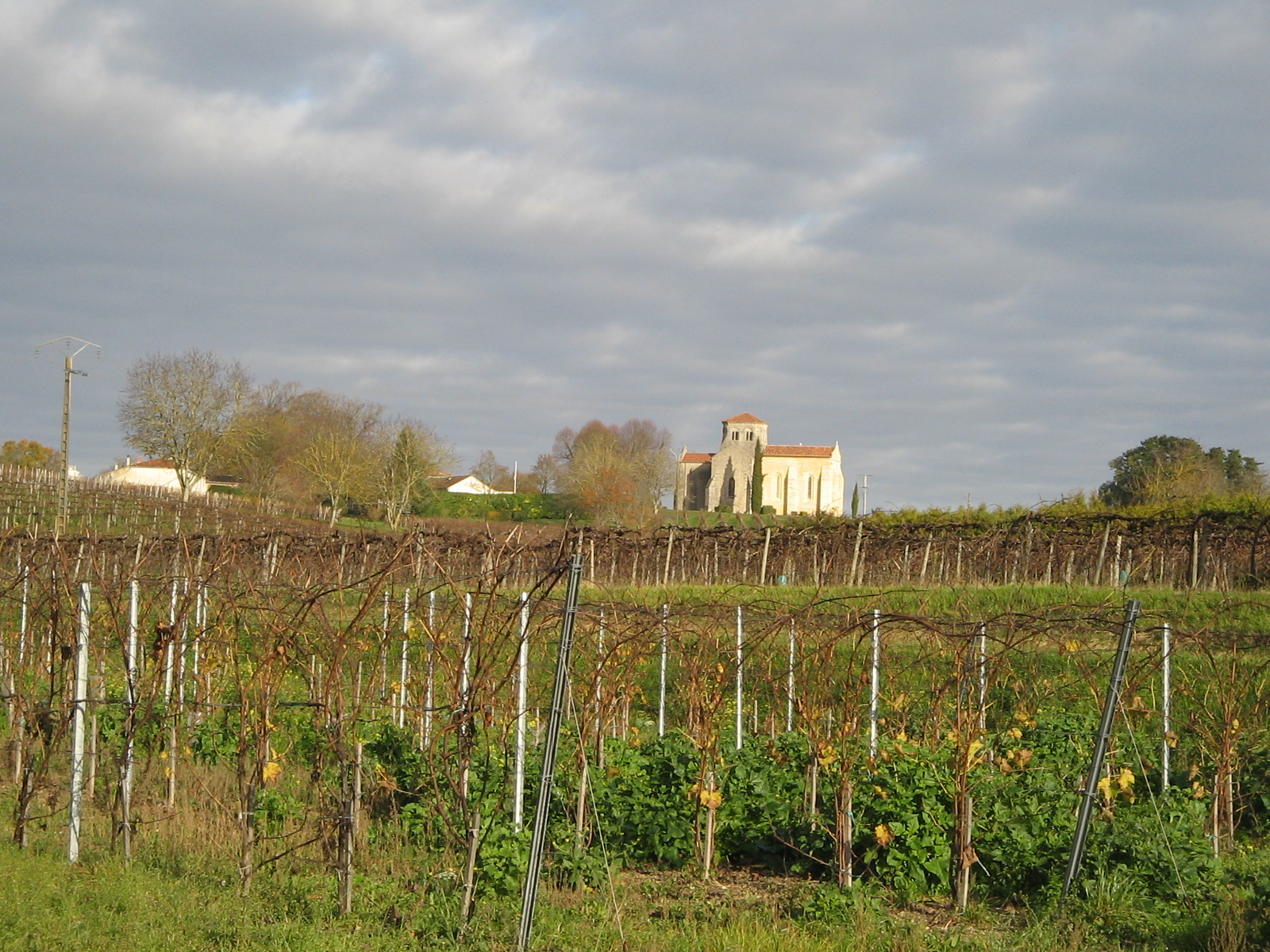 Vue de Saint-Eugène (17) en décembre 2011